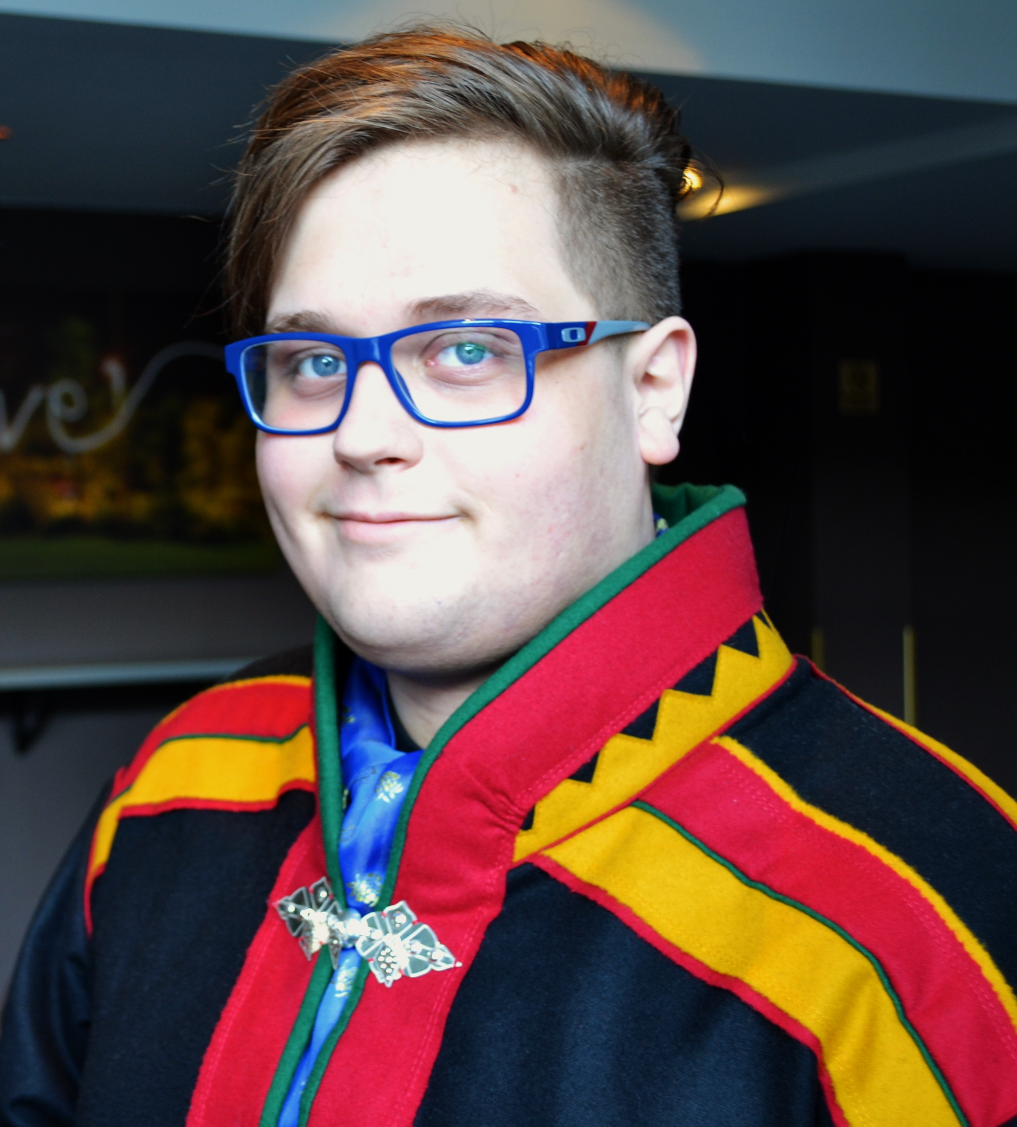 Piera Heaika Muotka er 3. kandidat til sametingsvalget for Norske Samers Riksforbund (NSR) i Gáisi valgkrets. Han er også leder for NSRs ungdomsutvalg.